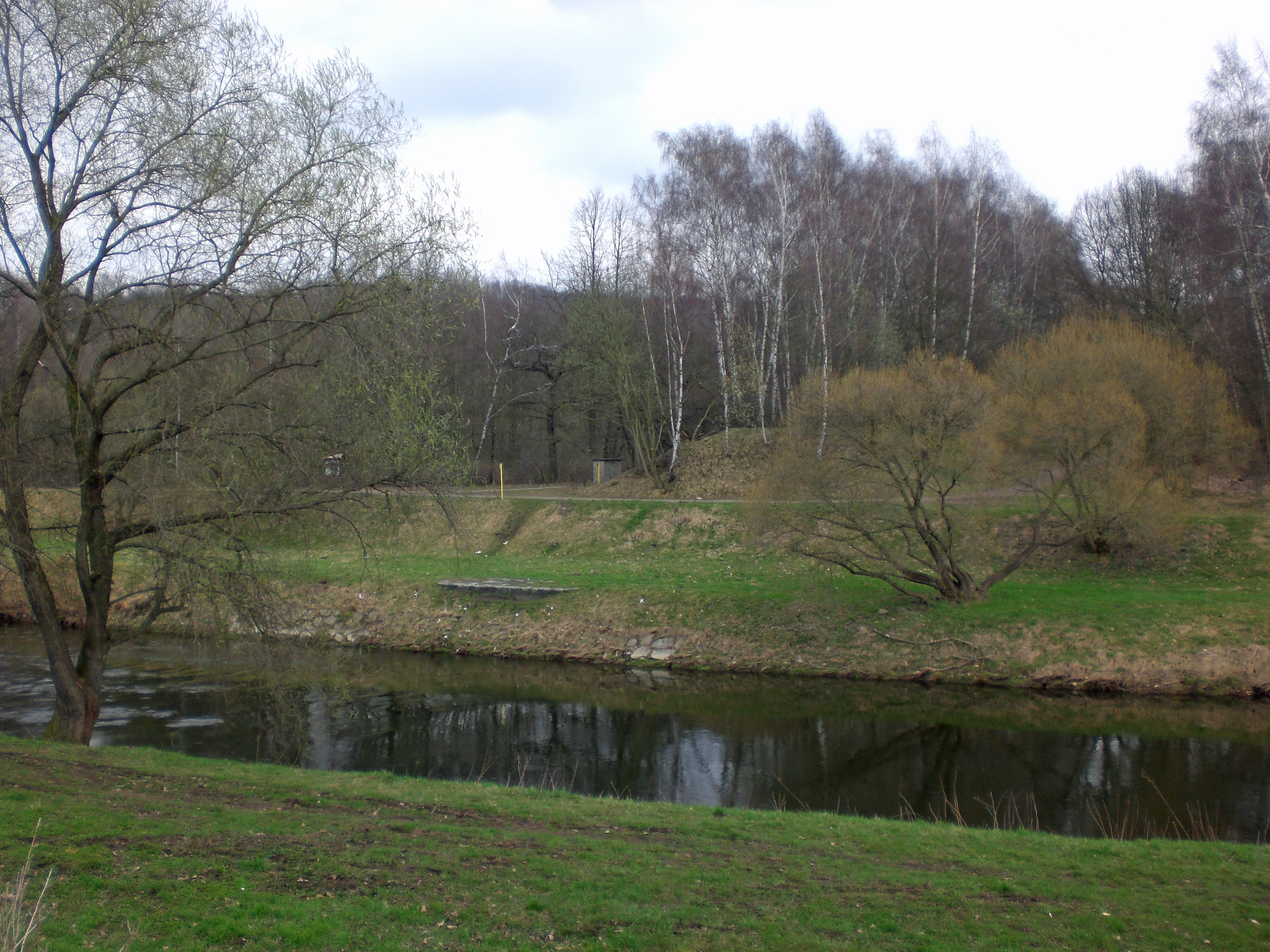 Blick über die Zwickauer Mulde auf das östliche Widerlager und Fundamentreste der Muldenbrücke sowie den Bahndamm der Oberhohndorf-Reinsdorfer Kohlenbahn. Zwickau, Sachsen, Deutschland.